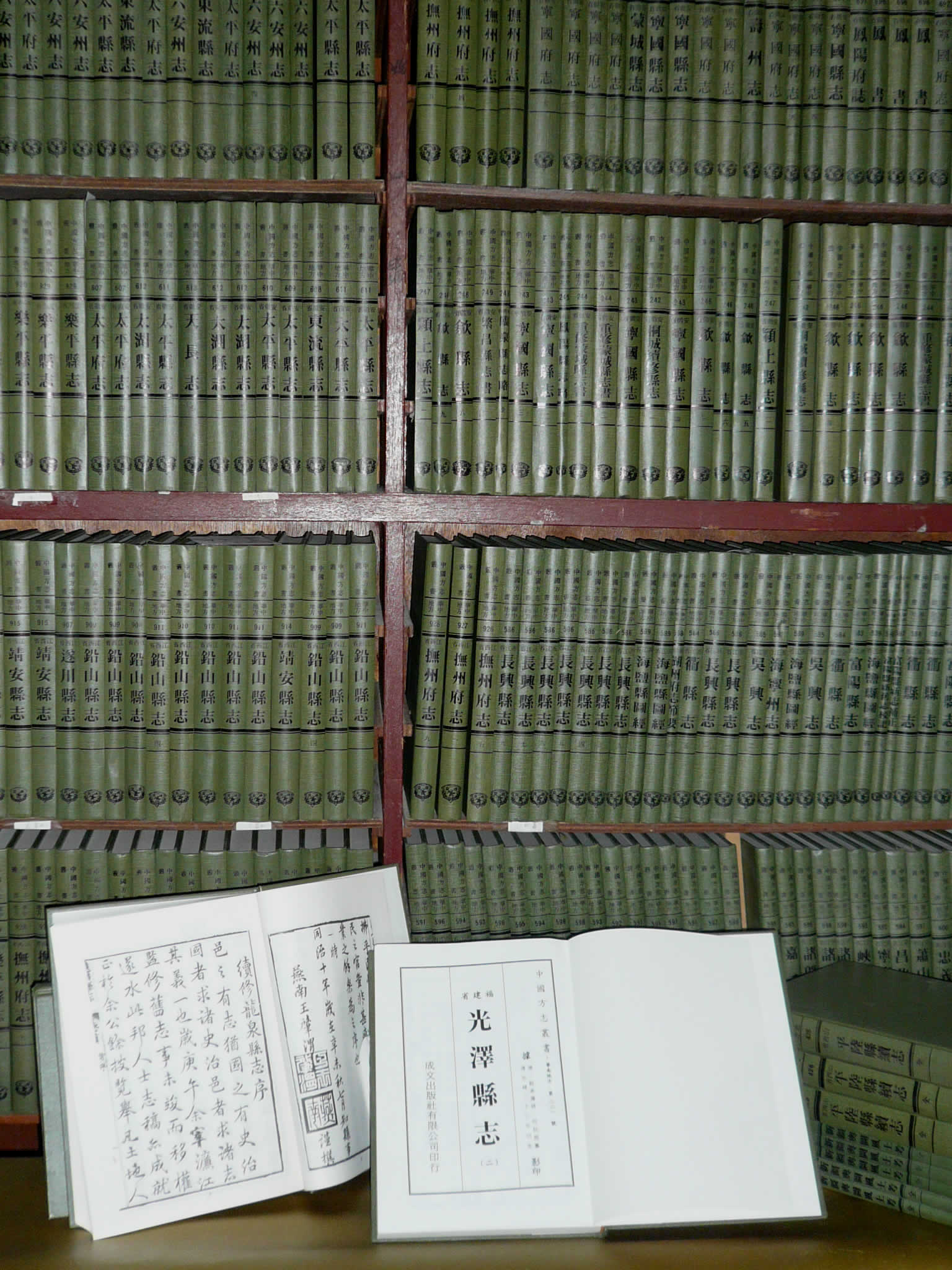 中國方志叢書的書影